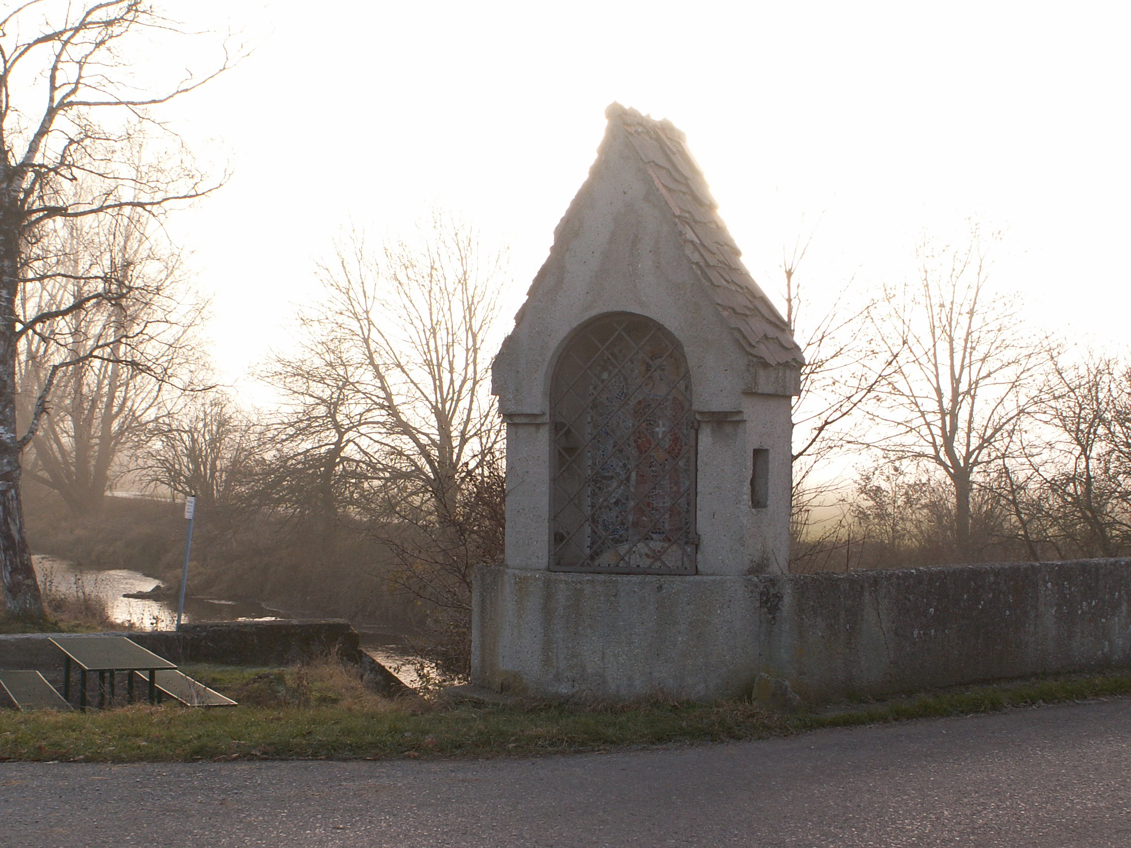 Bildstock an der Geltnachbrücke bei Kreen, Biessenhofen